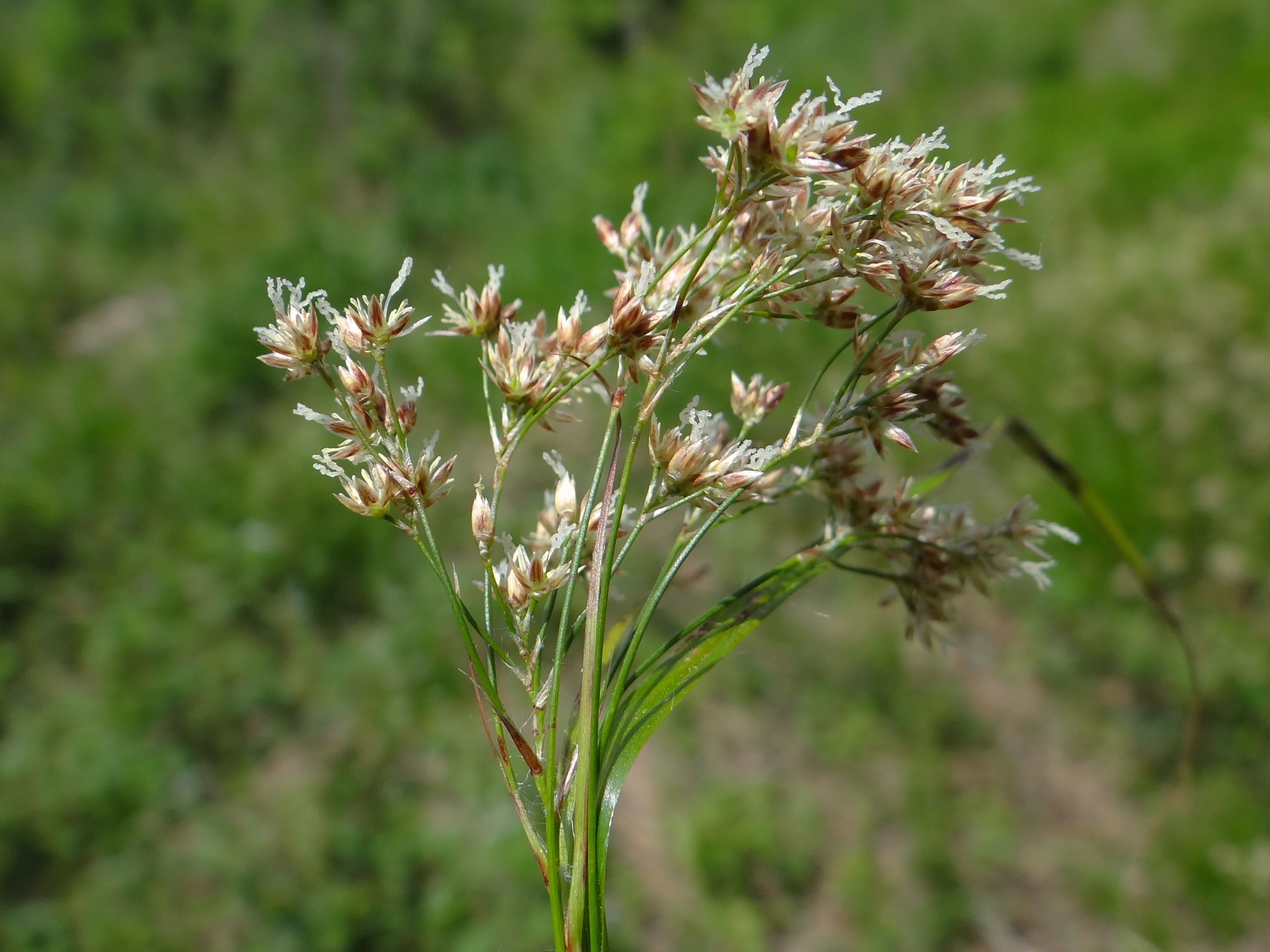 Luzula sylvatica (location: Poland, Beskid Żywiecki, Pasmo Policy, Okrąglica)